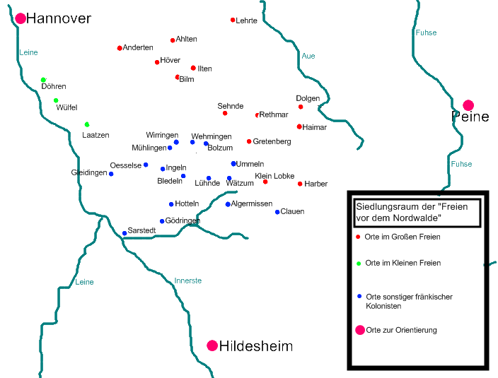 Lage des Siedlungsraums der Freien vor dem Nordwalde